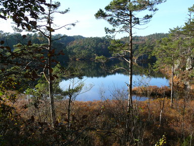 Bråvann innsjø